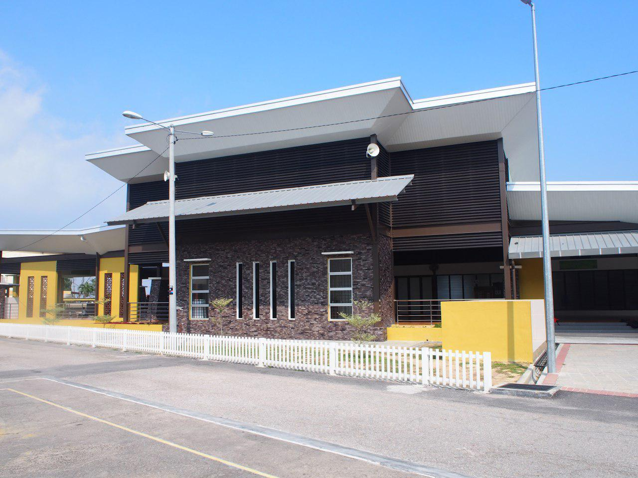 Surau Al-Abrar yang siap dibina pada tahun 2016